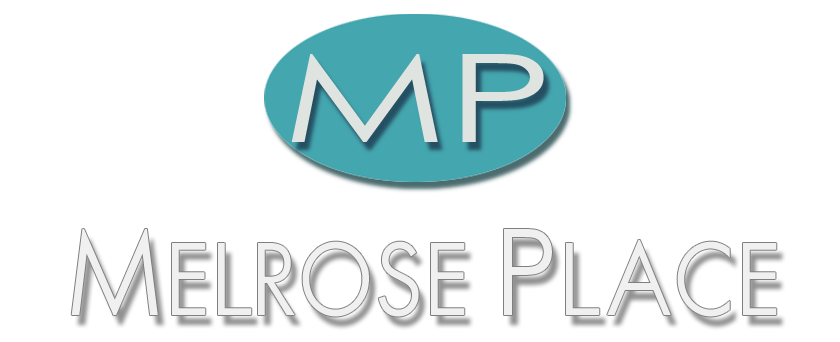 MelrosePlace Logo